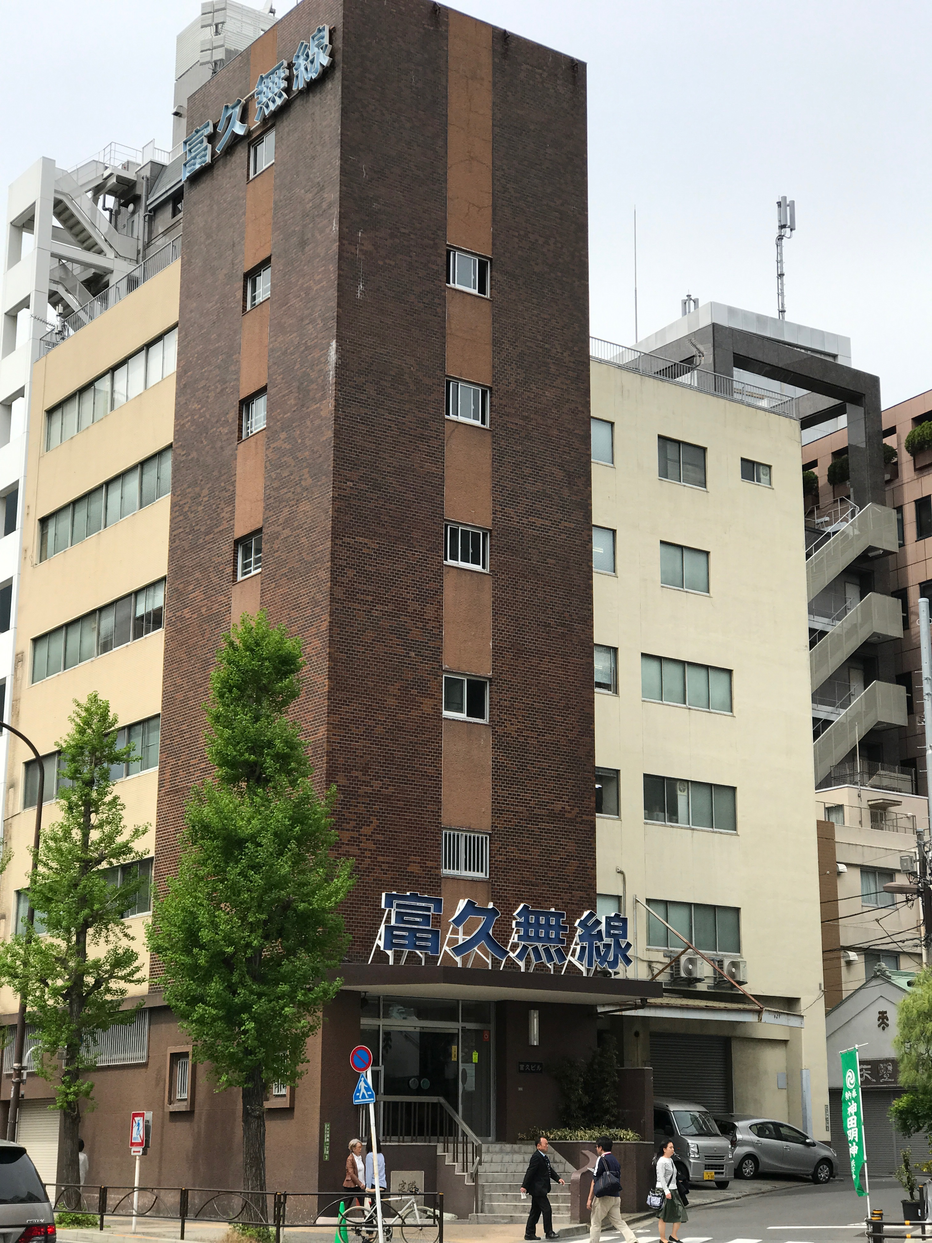 東京都文京区湯島1-3-1 富久ビル